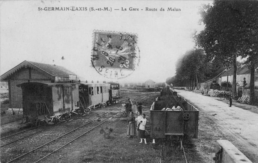 Gare de Saint-Germain-Laxis dans les années 20.